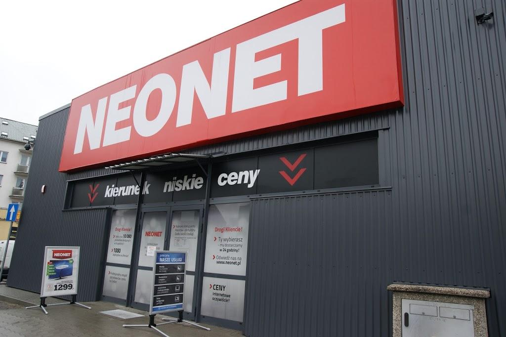 Sklep Neonet w Kaliszu